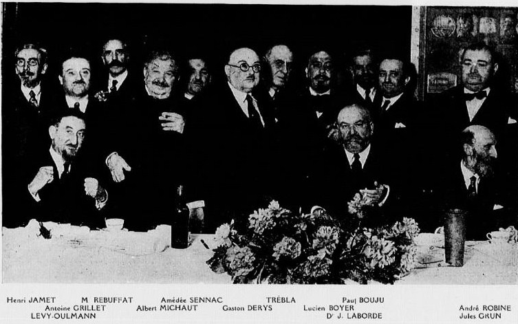 Une réunion de la goguette du Cornet à Paris en 1934.